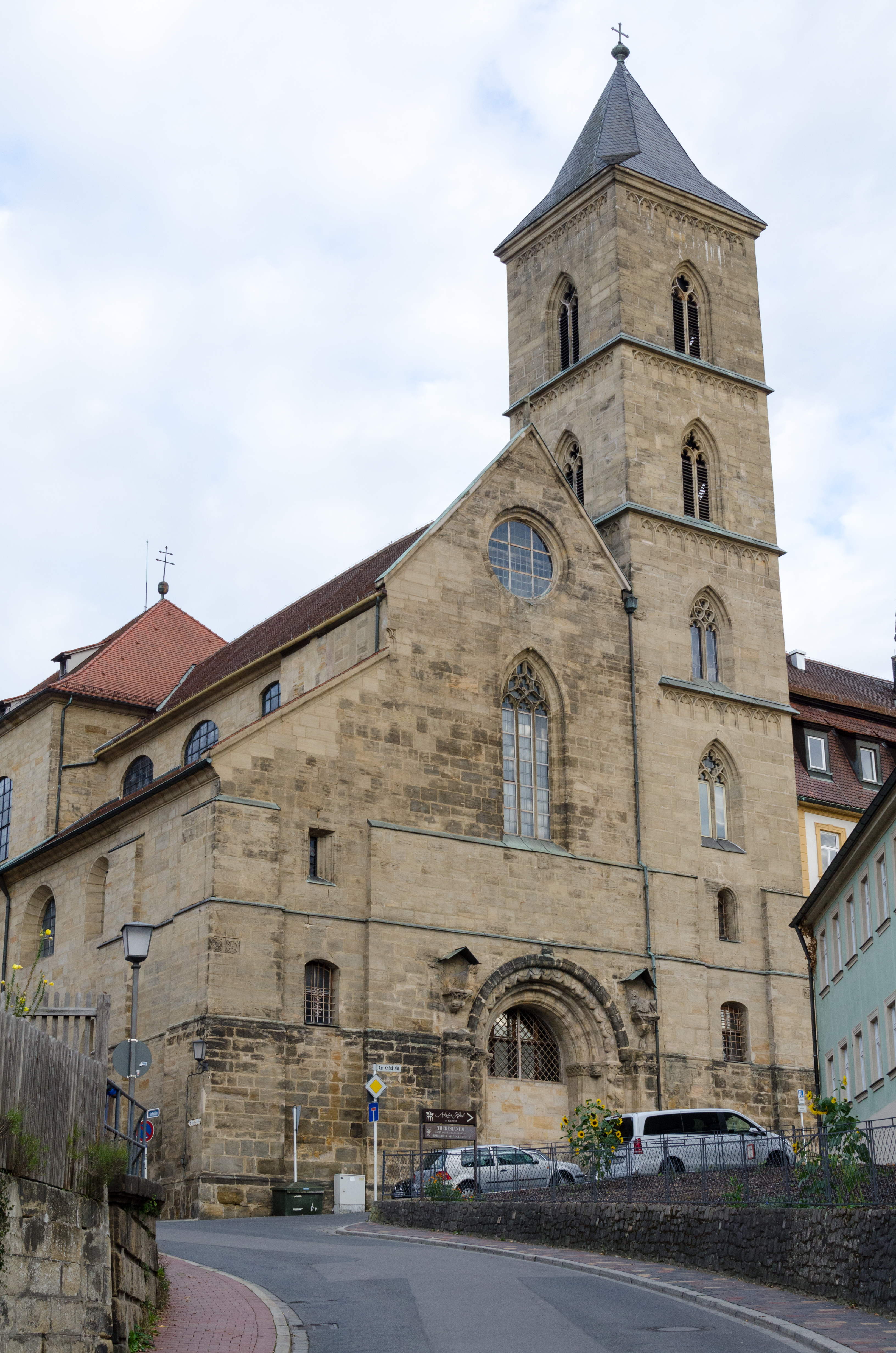 Bamberg, Karmeliterkirche, von Westen